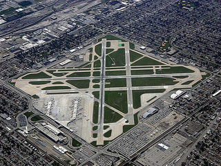 Vista aérea del Aeropuerto Internacional Midway Chicago Midway Airport. By Scott Giard